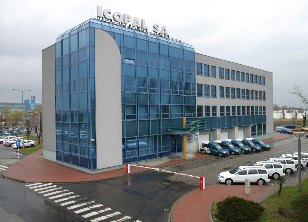 Siedziba Icopal SA w Zduńskiej Woli